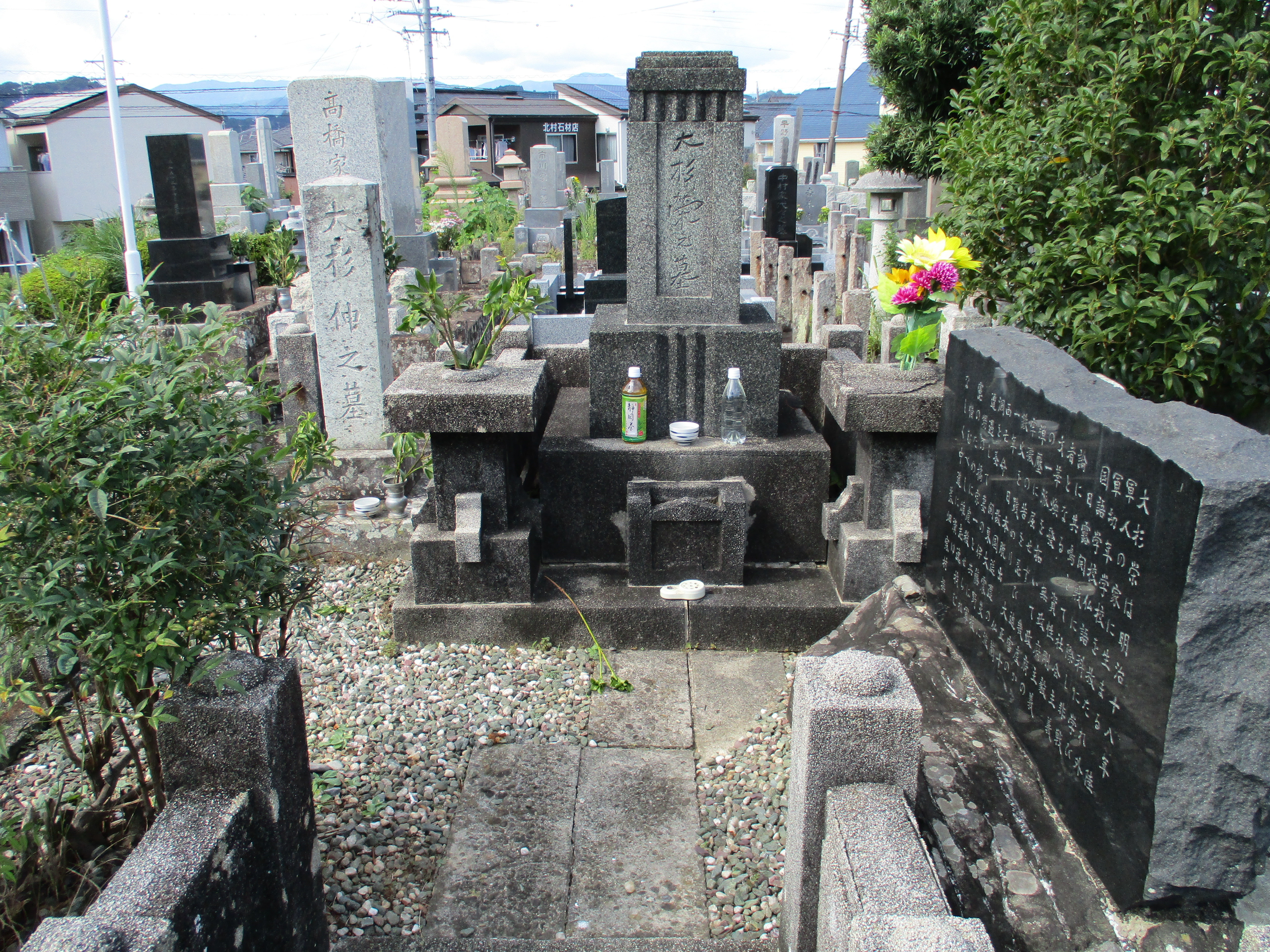 明治・大正期の日本のアナキスト、大杉栄の墓。静岡県静岡市葵区沓谷霊園にある。